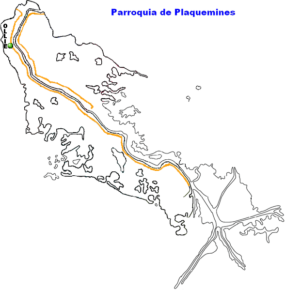 Ollie, Louisiana.